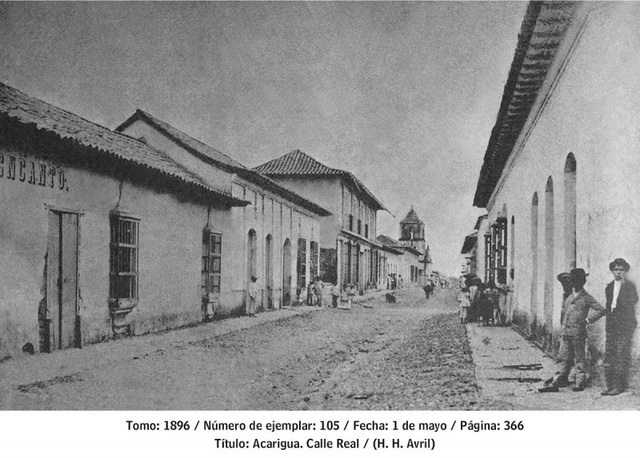 Tomado de la Revista el Cojo Ilustrado